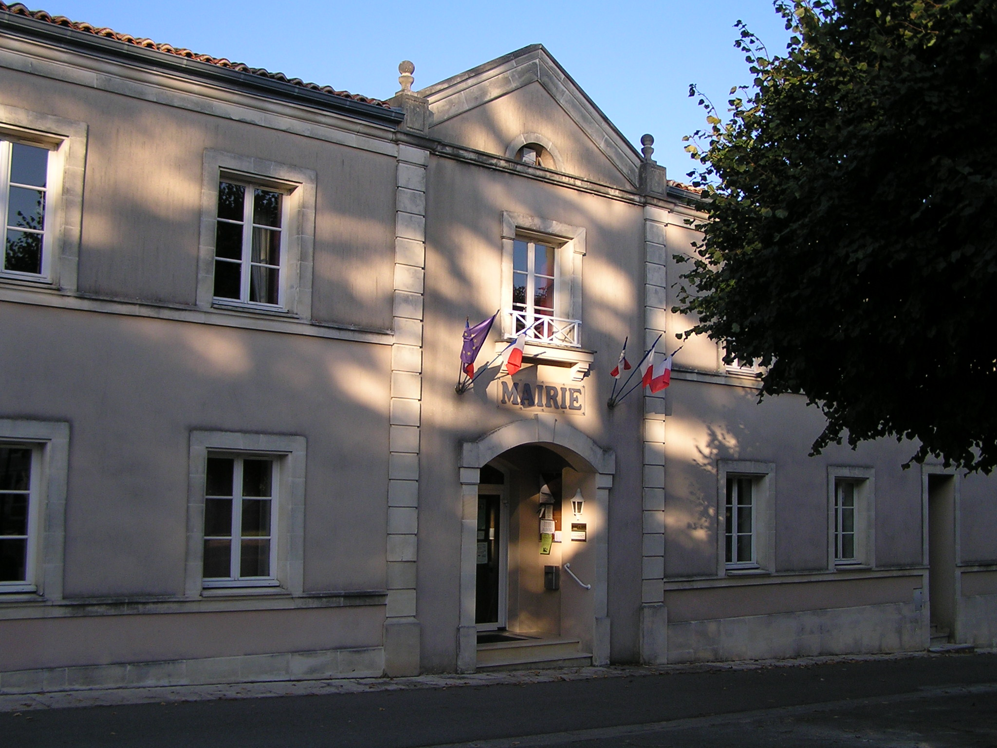 mairie de Sers